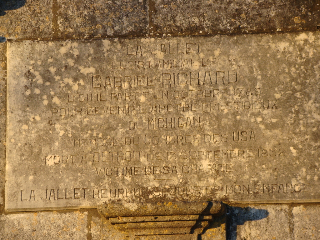 Inscription à la mémoire du Père Gabriel Richard sur le fronton du logis de La Jallet à Saint Denis du Pin